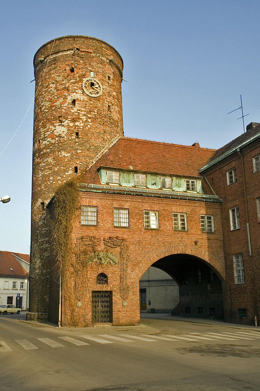 Lubsko-wieza bramy zaganskiej